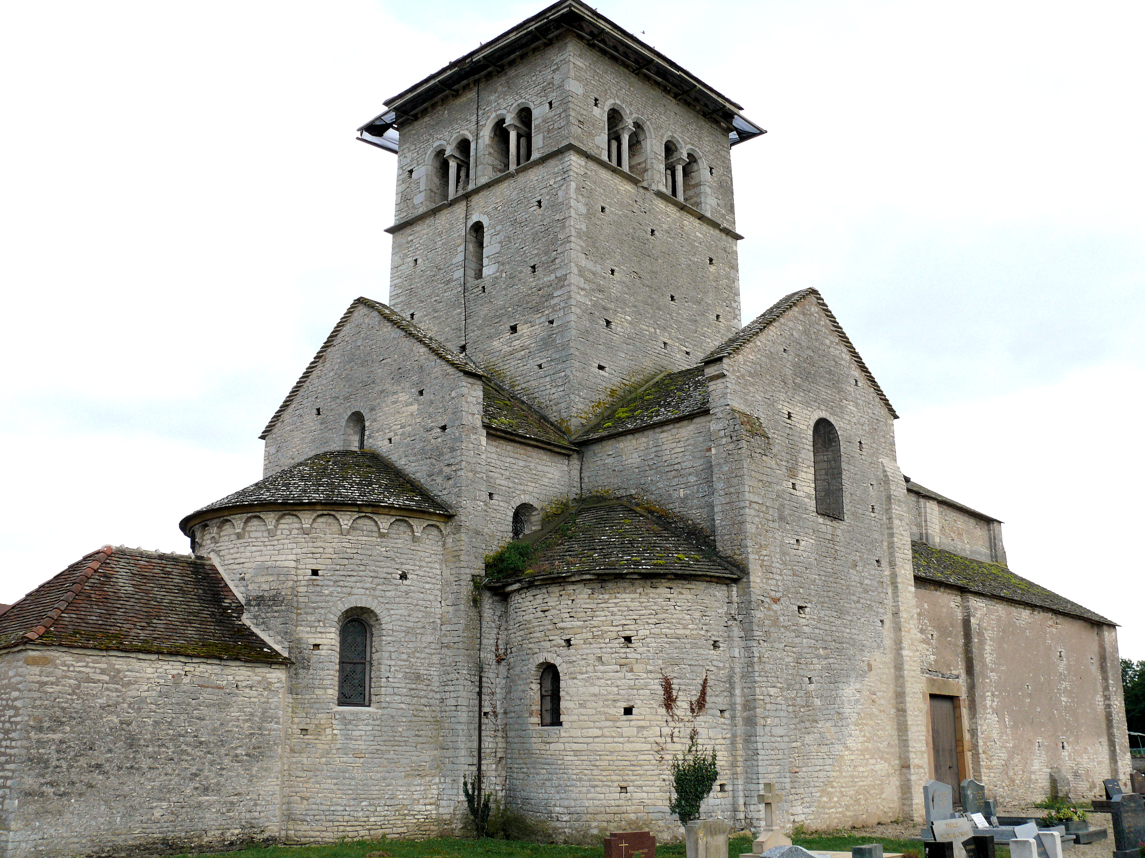 Malay - Eglise Notre-Dame